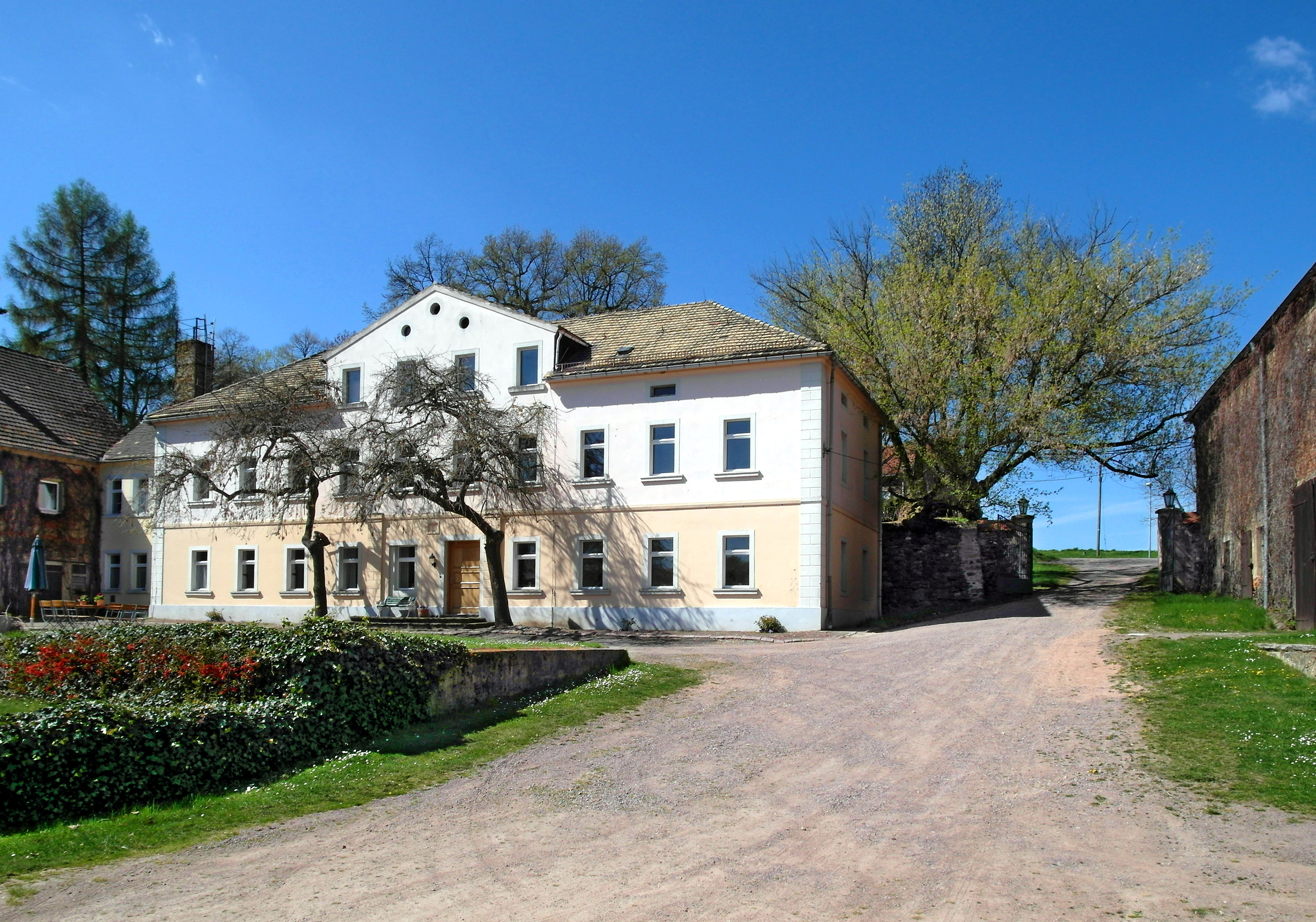 20.04.2015 04720 Gödelitz (Mochau): Gut Gödelitz, Gödelitz 1. Sitz des "Ost-West-Forum Gut Gödelitz". [SAM9977.JPG]20150420710DR.JPG(c)Blobelt